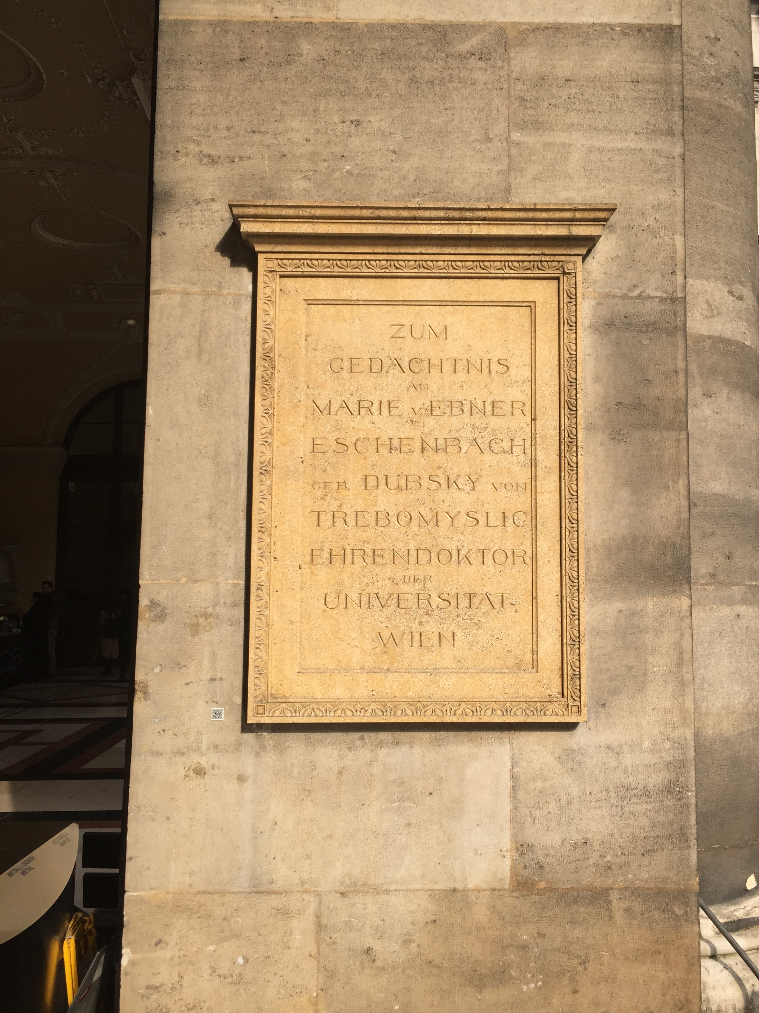 Plaque commémorative de Marie Eschenbach à l'Université de Vienne